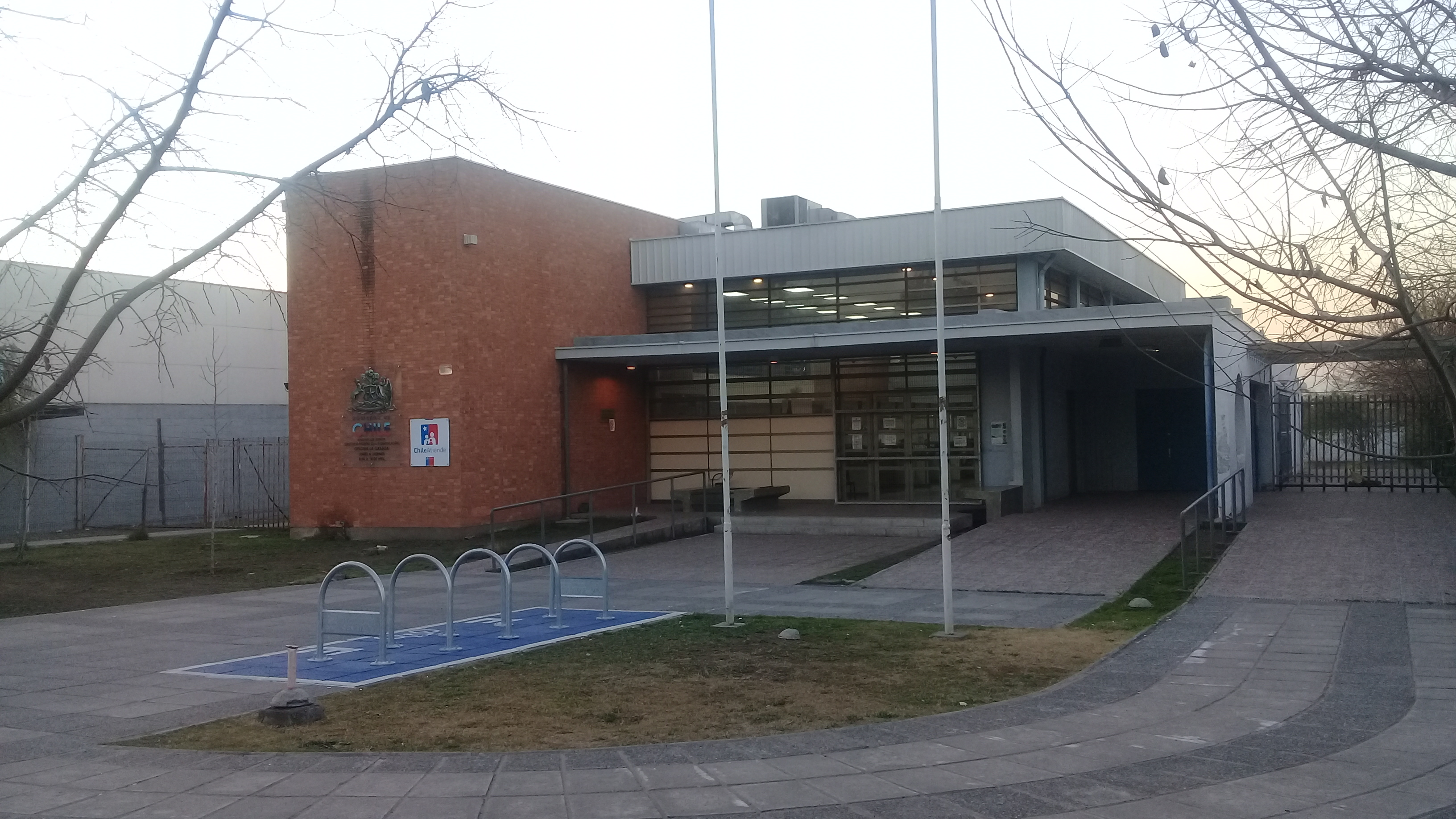 Edificio de la sede La Granja del Servicio de Registro Civil e Identificación de Chile.